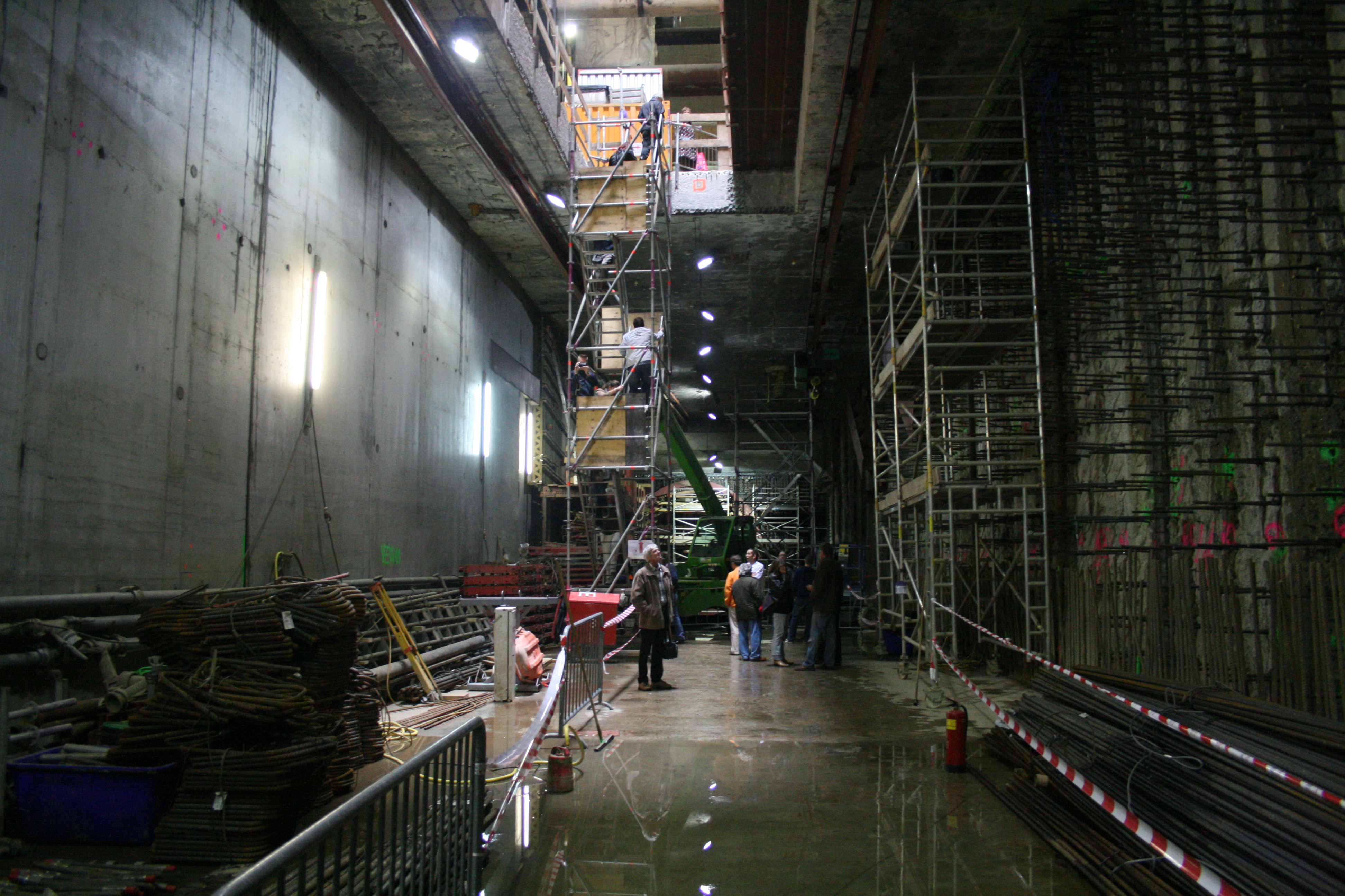 Het diepste niveau van het metrostation Ceintuurbaan van de Amsterdamse Noord/Zuidlijn.